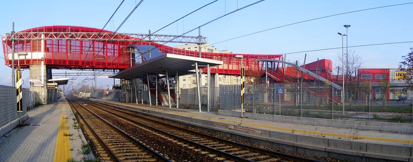 La stazione di Grugliasco, in località Borgata Paradiso